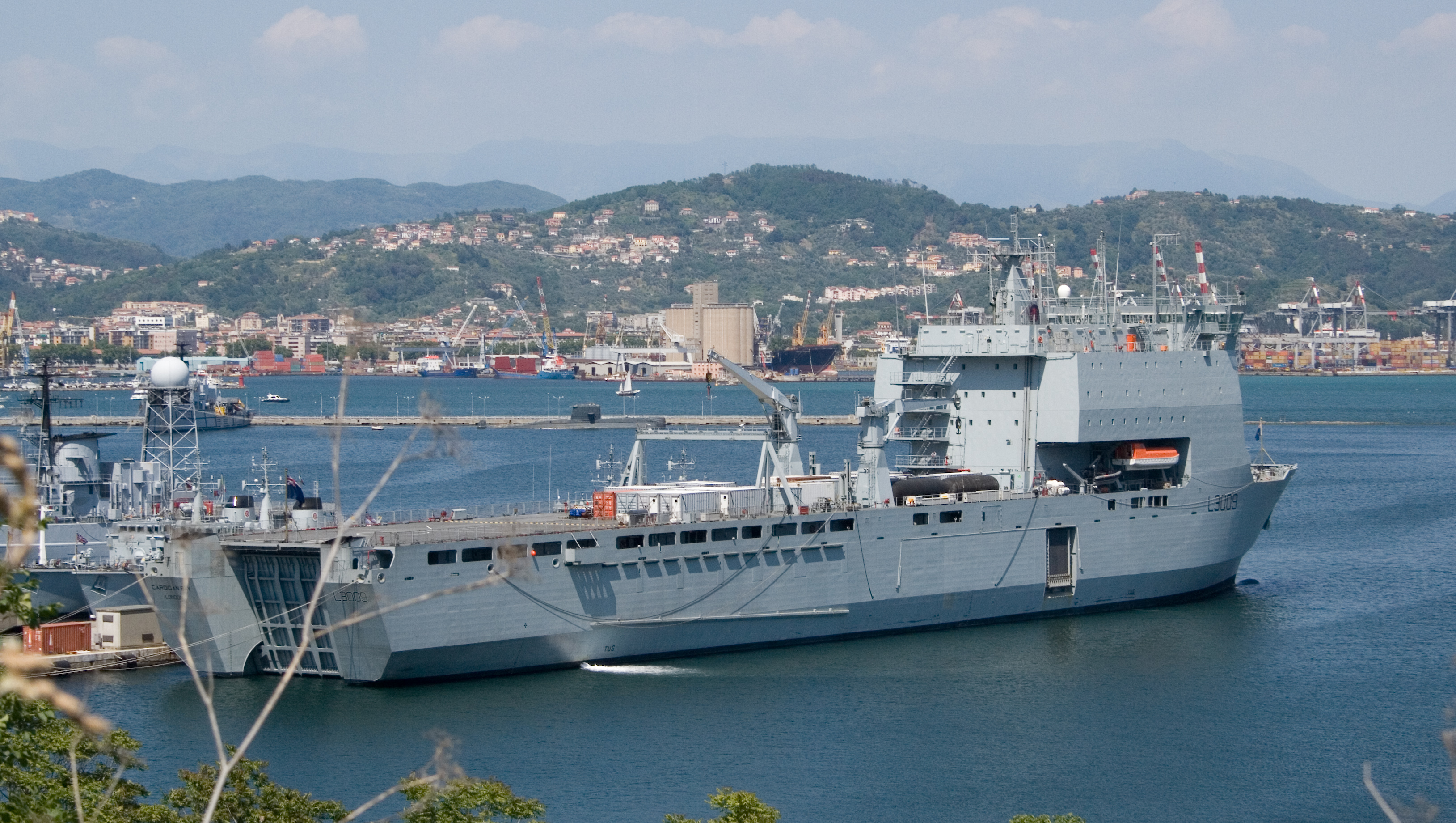 Le RFA Cardigan Bay (L3009) dans le port italien de la Spézia